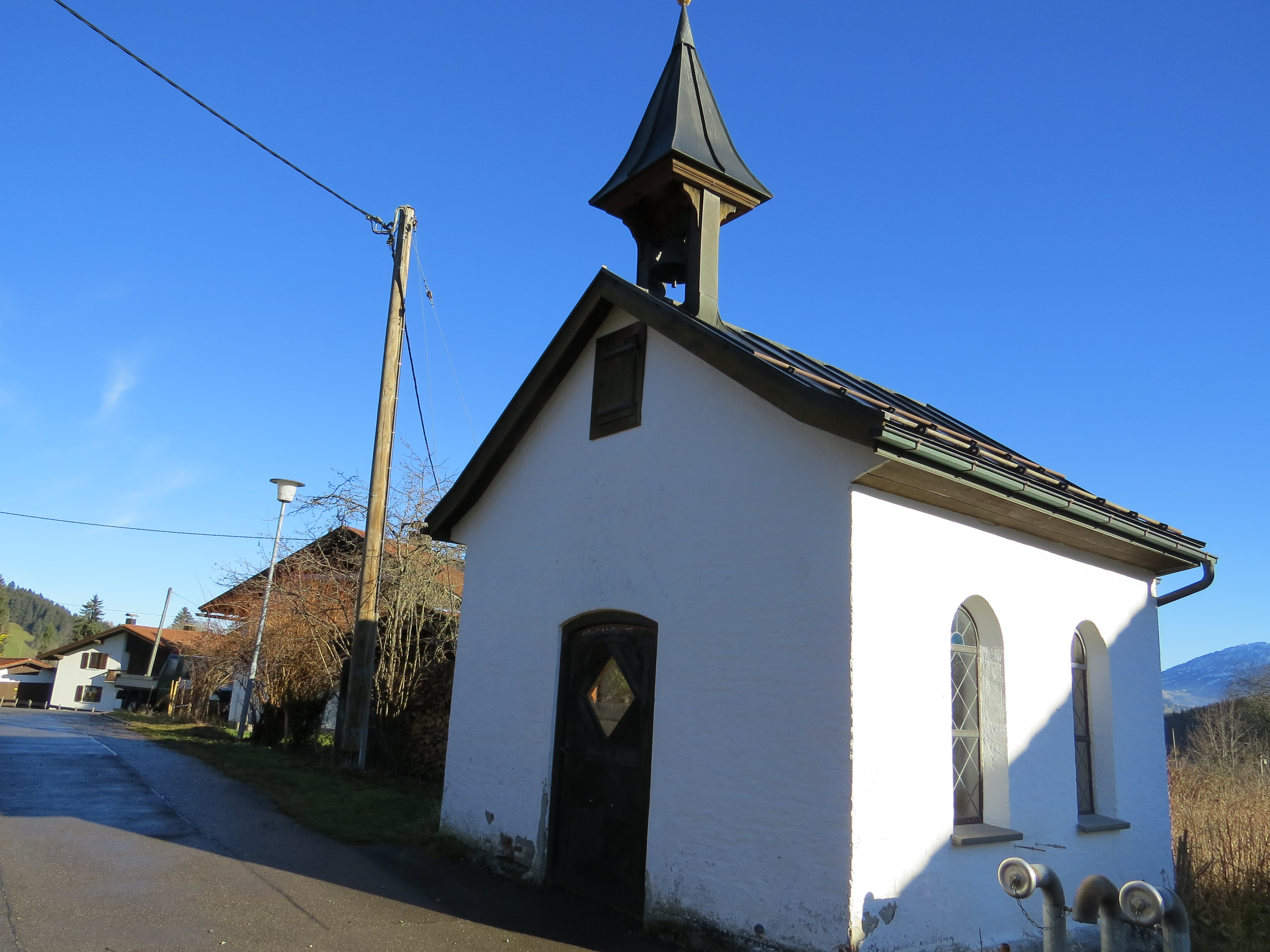 Kapelle in Bettenried, Ofterschwang